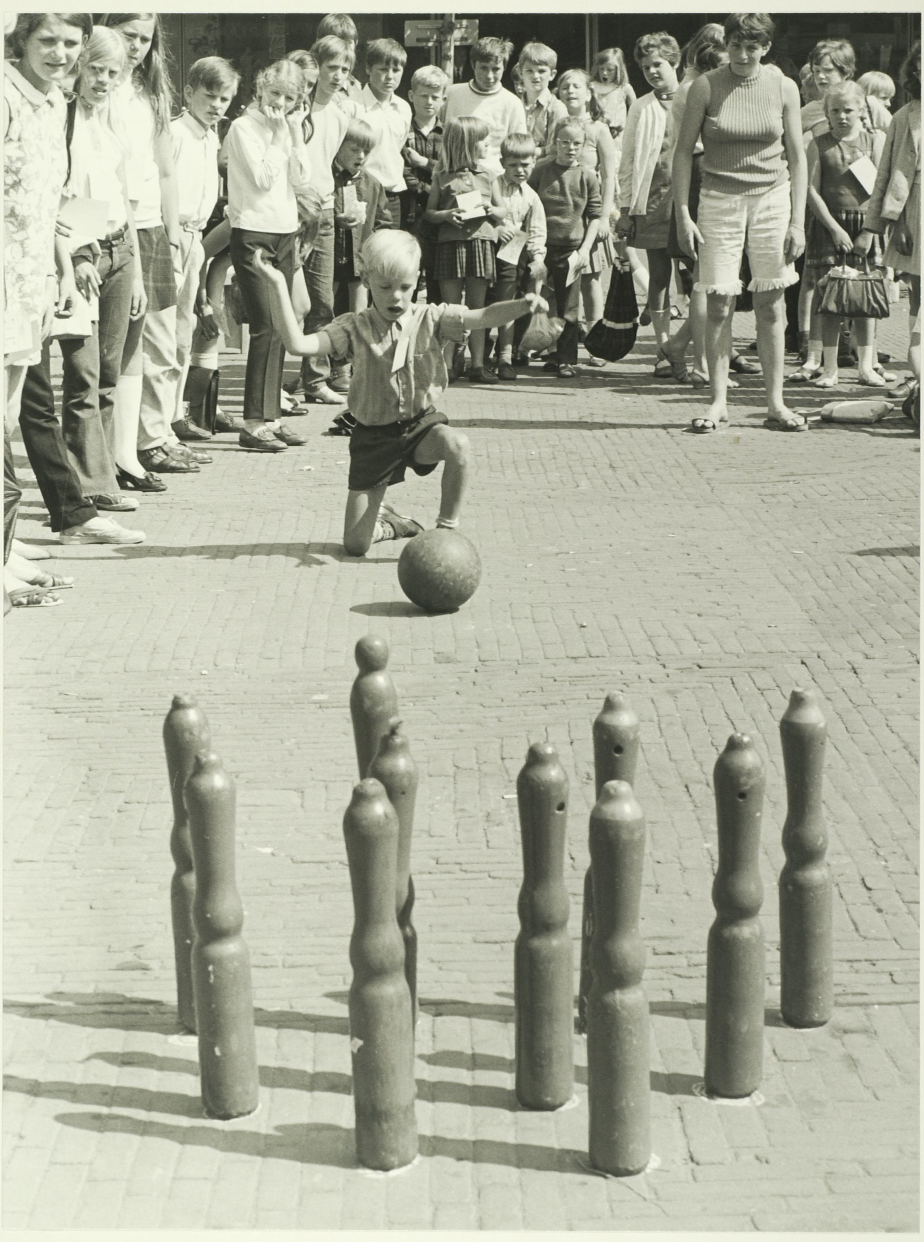 CollectieCollectie Fotoburo de BoerInventarisnummerNL-HlmNHA_5400467443 BeschrijvingKinderspelen op de Grote Markt, tijdens de schoolvakantiesFotonummerNL-HlmNHA_5400467443DocumenttypeHistorieprenten, tekeningen en foto'sVervaardigerBoer, Cees de (1918-1985) Naam objectGrote MarktLandNederland ProvincieNoord-Holland GemeenteHaarlem PlaatsHaarlem Begindatum1970Einddatum1970TechniekFoto Plaatsinggb69